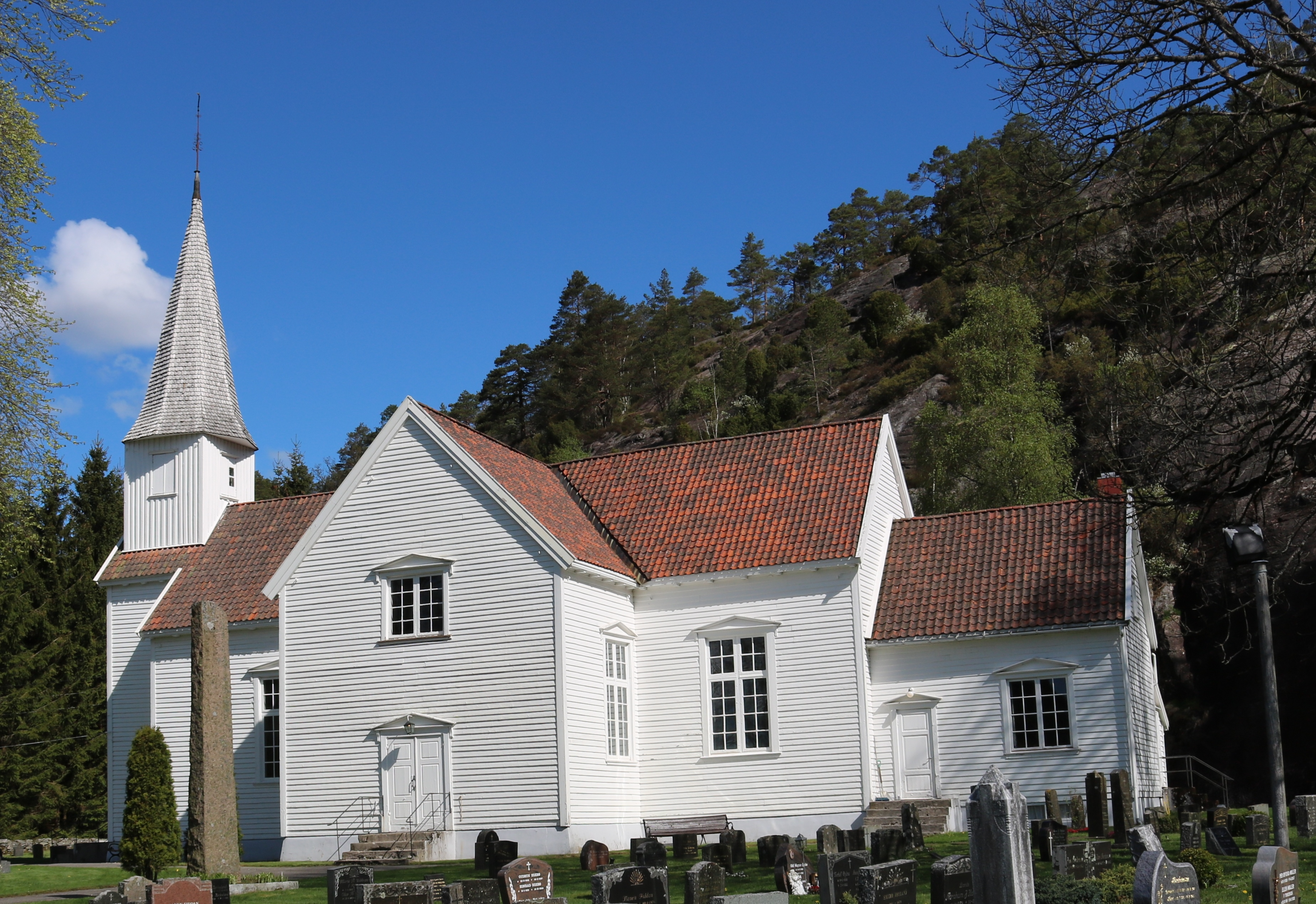 Konsmo kirke i Audnedal. Foto: Rolf Steinar Bergli, fra Lokalhistoriewiki.